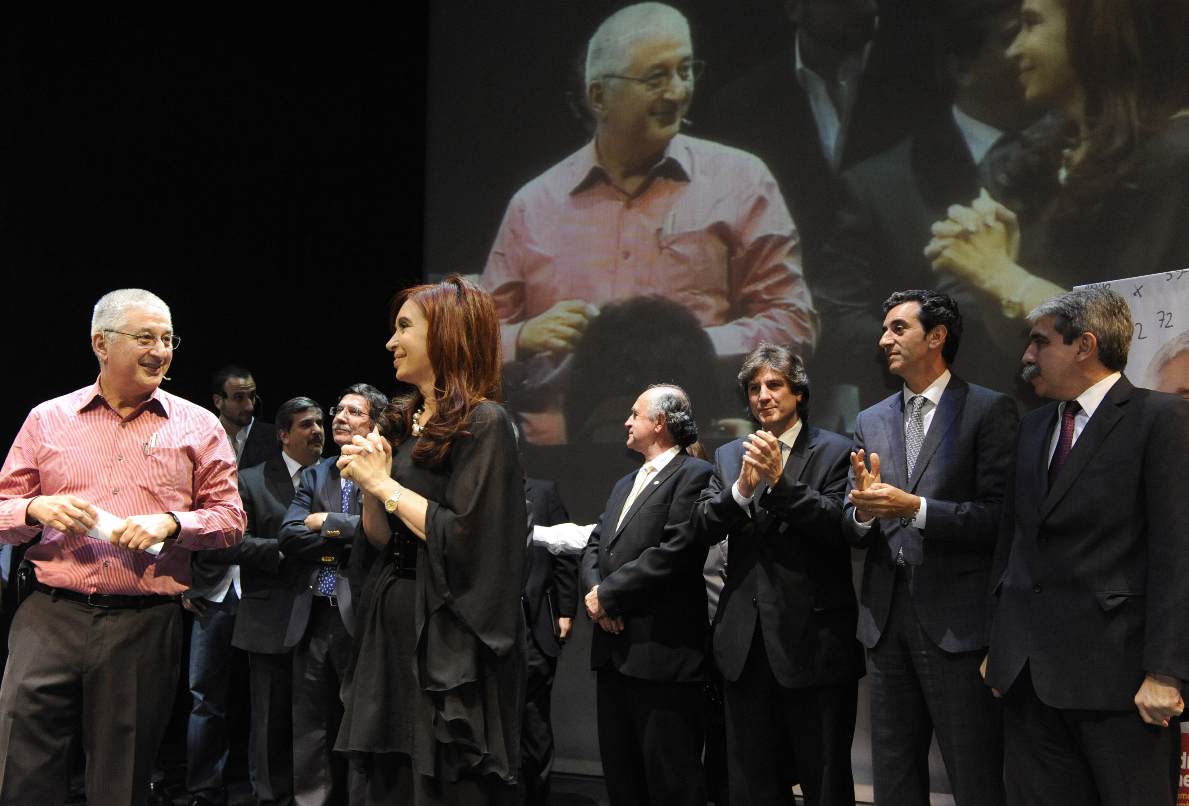 La presidenta Cristina Fernández junto al periodista y matemático Adrián Paenza durante la presentación del nuevo libro del autor. Los acompañan el jefe de gabinete, Aníbal Fernández, los ministros de Economía, Amado Boudou, del Interior, Florencio Randazzo, de Educación, Alberto Sileoni, y el secretario general de la Presidencia, Oscar Parrilli, entre otros funcionarios.